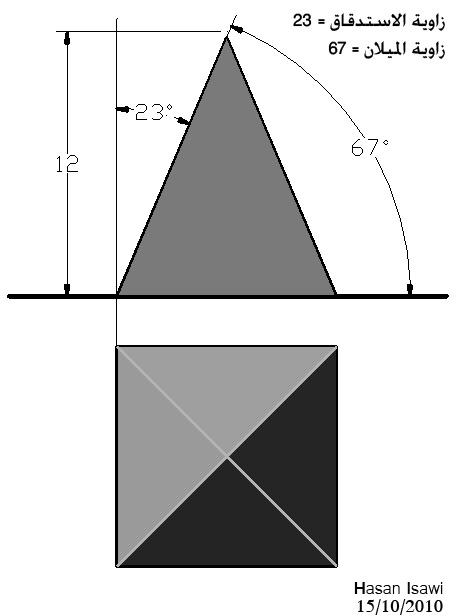 Angolo di rastremazione modellazione di una piramide retta in AutoCAD - disegnare le proiezioni ortogonali della piramide, per calcolare altezza del vertice (12), e l'angolo di rastremazione (67) per ottenere il modello 3D della piramide, si procede cosi: - estrudere il quadrato ad una altezza = 12 - digitare il valore 67 come angolo di rastremazione sito dell`autore Hasan Isawi